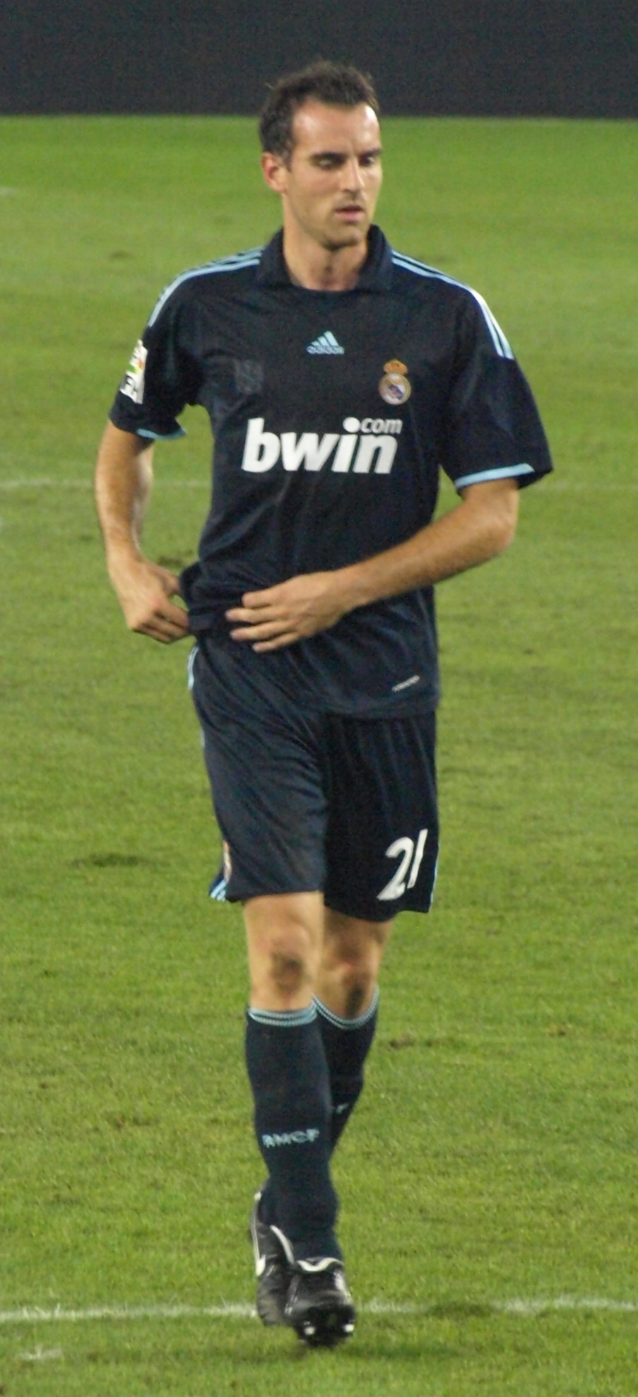 Christoph Metzelder en el partido que enfrentó al Real Madrid con el RCD Español en el Estadio de Cornellá-El Prat de la primera vuelta de La Liga 2009/10.